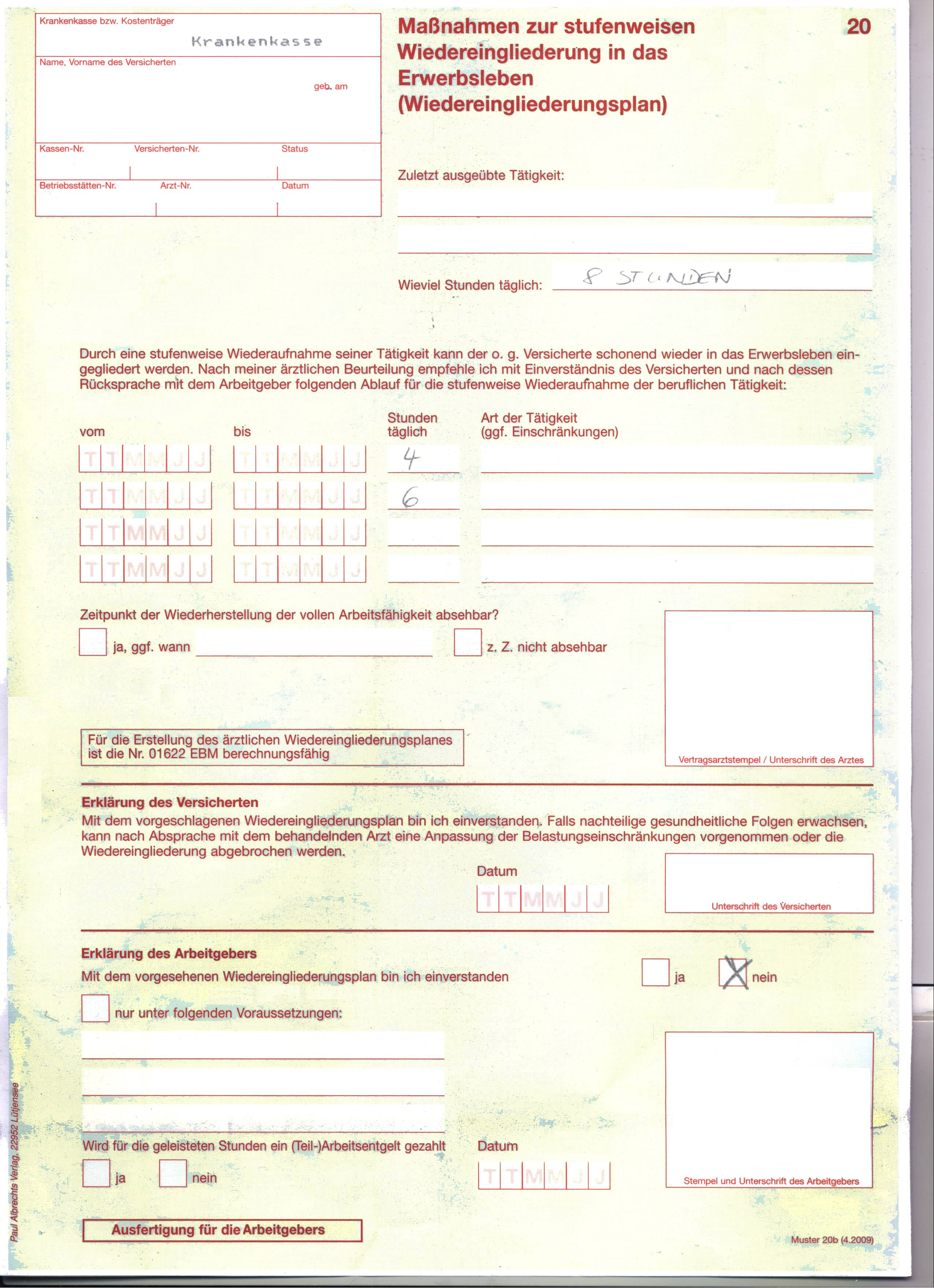 Formular für die Beantrag der "Stufenweisen Wiedereingliederung in das Erwerbsleben".